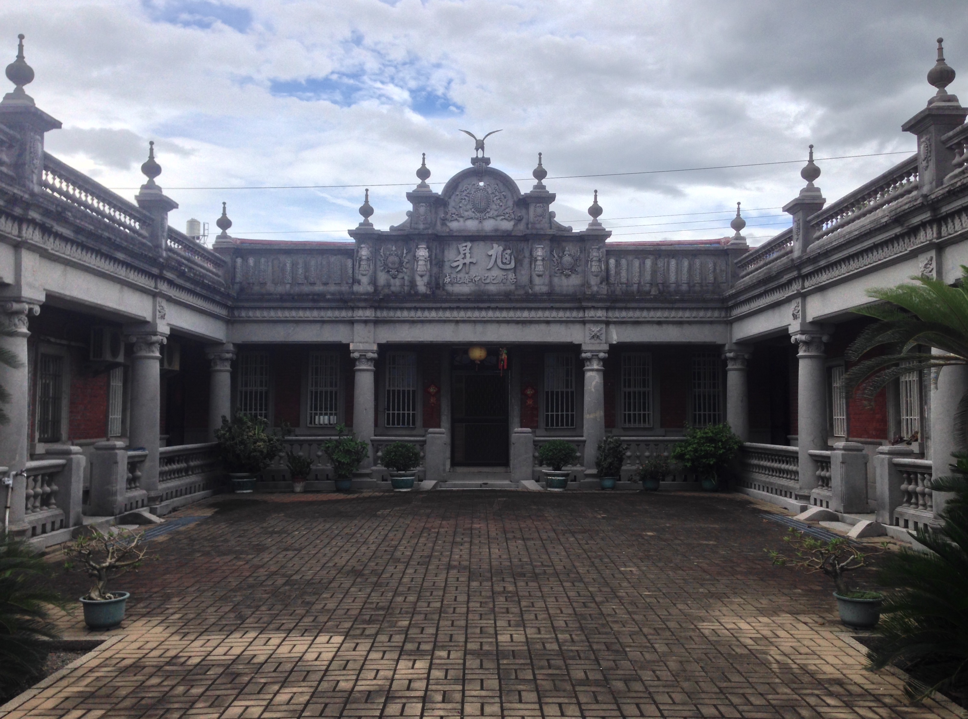 中文（台灣）: 南州鄉七塊村旭昇居